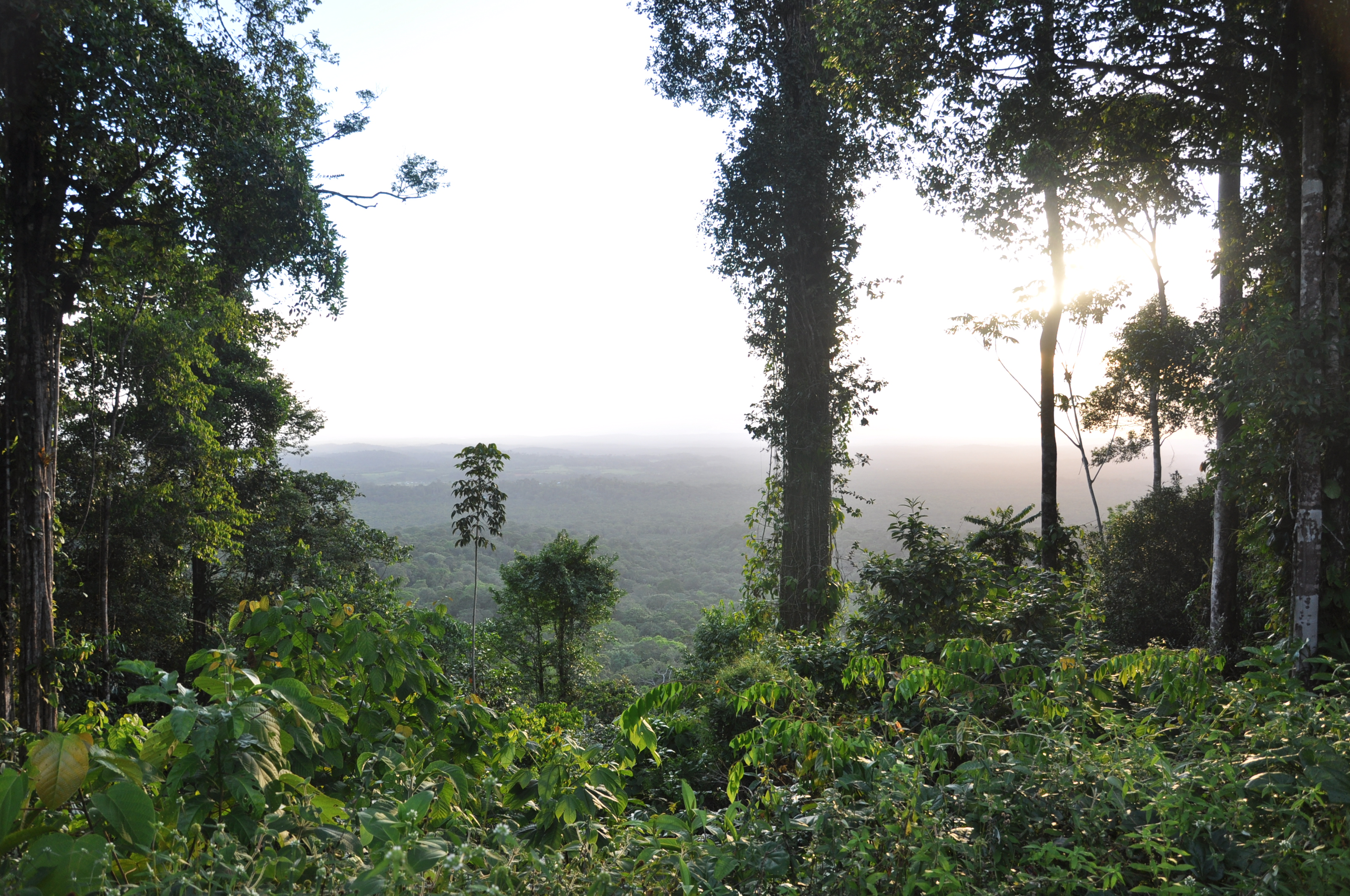 Vue depuis la Montagne de Kaw - Guyane Française